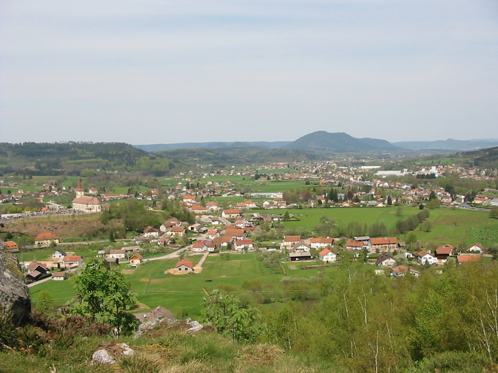 Anould Commune des Vosges Panorama de la Roche du Sphinx Photographie personnelle, prise le 3 mai 2006 Copyright © Christian Amet